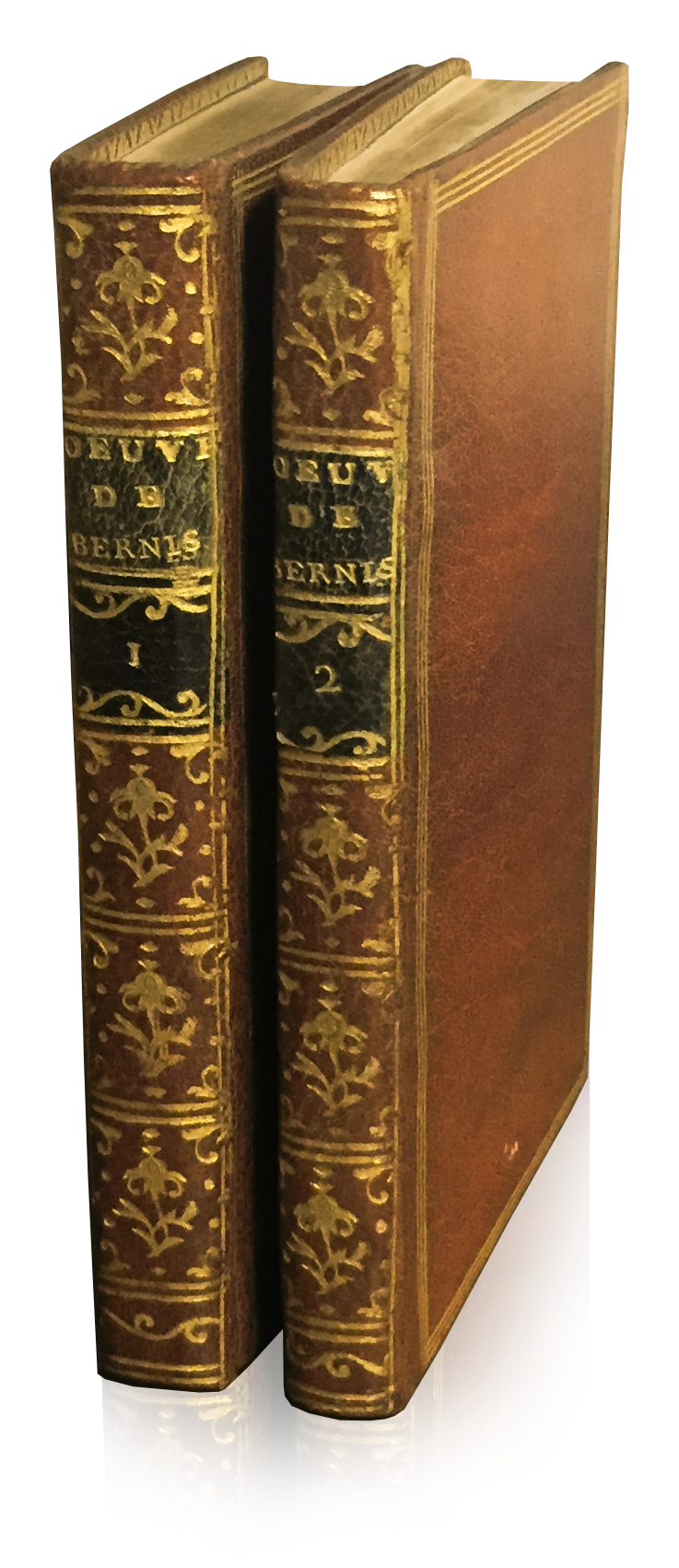 Rilegatura delle opere di cazin